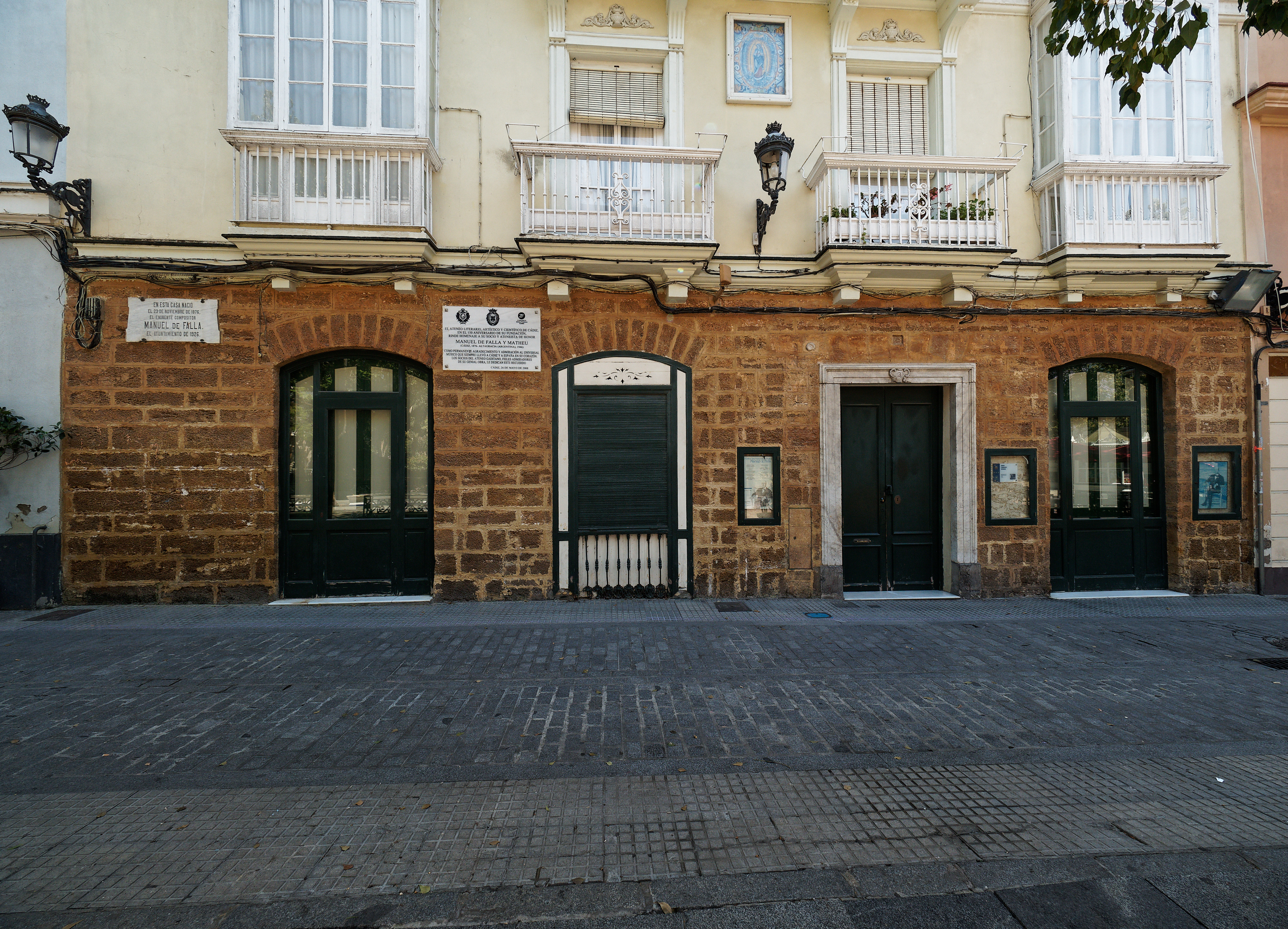 Geburtshaus mit Hinweistafel von Manuel de Falla Plaza de España Nr. 3, Cádiz, Spanien.